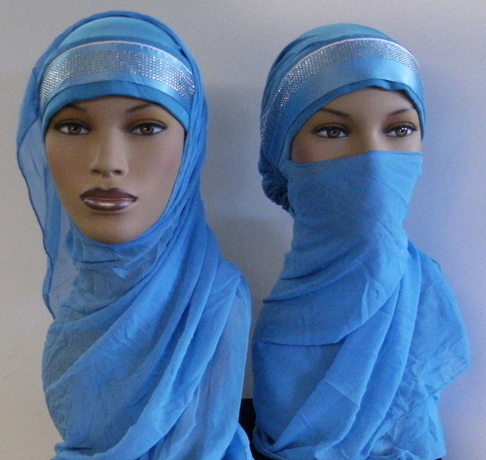 скромная одежда для muslims и non-muslims